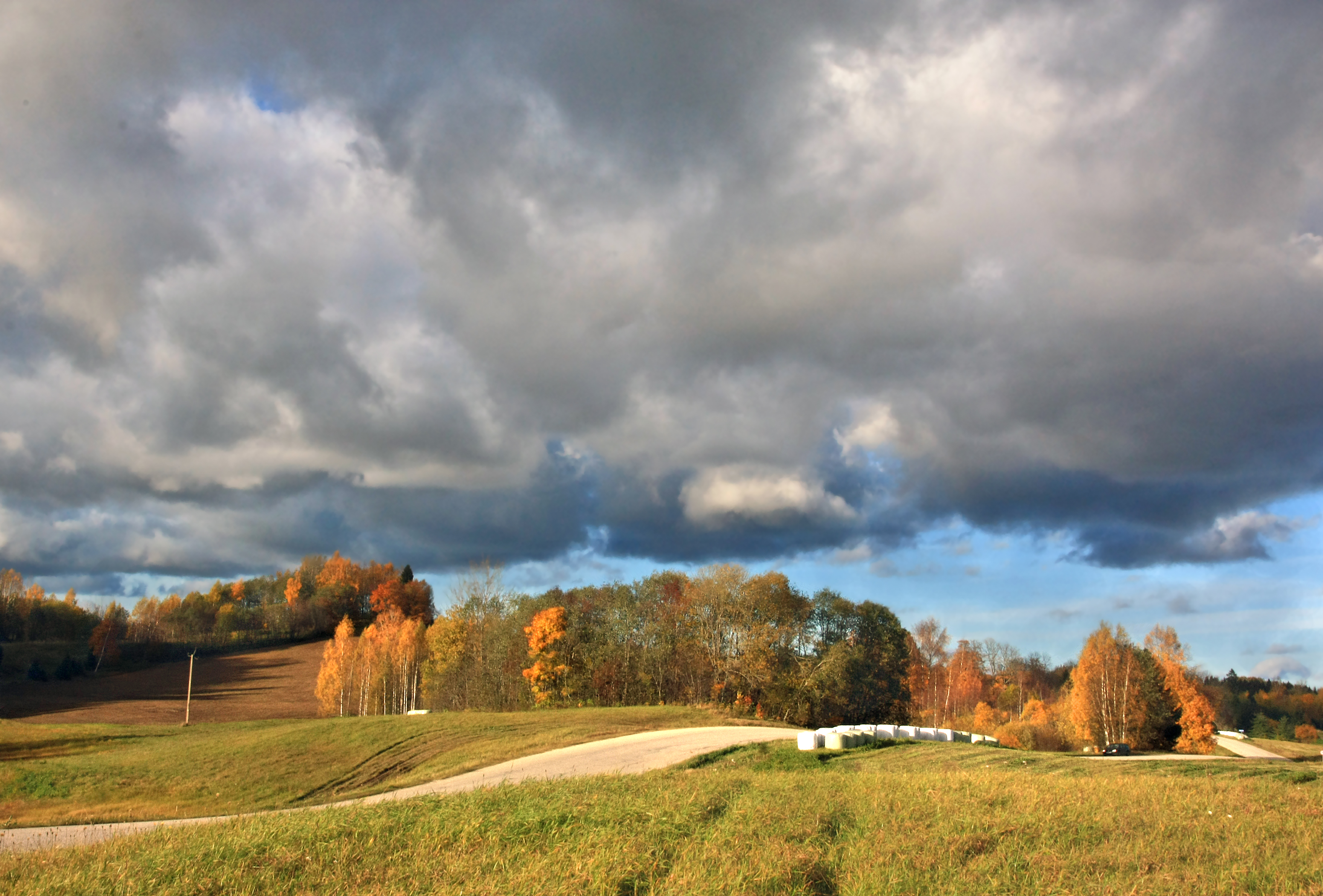 Plaani küla läbiv Kose-Käbli tee